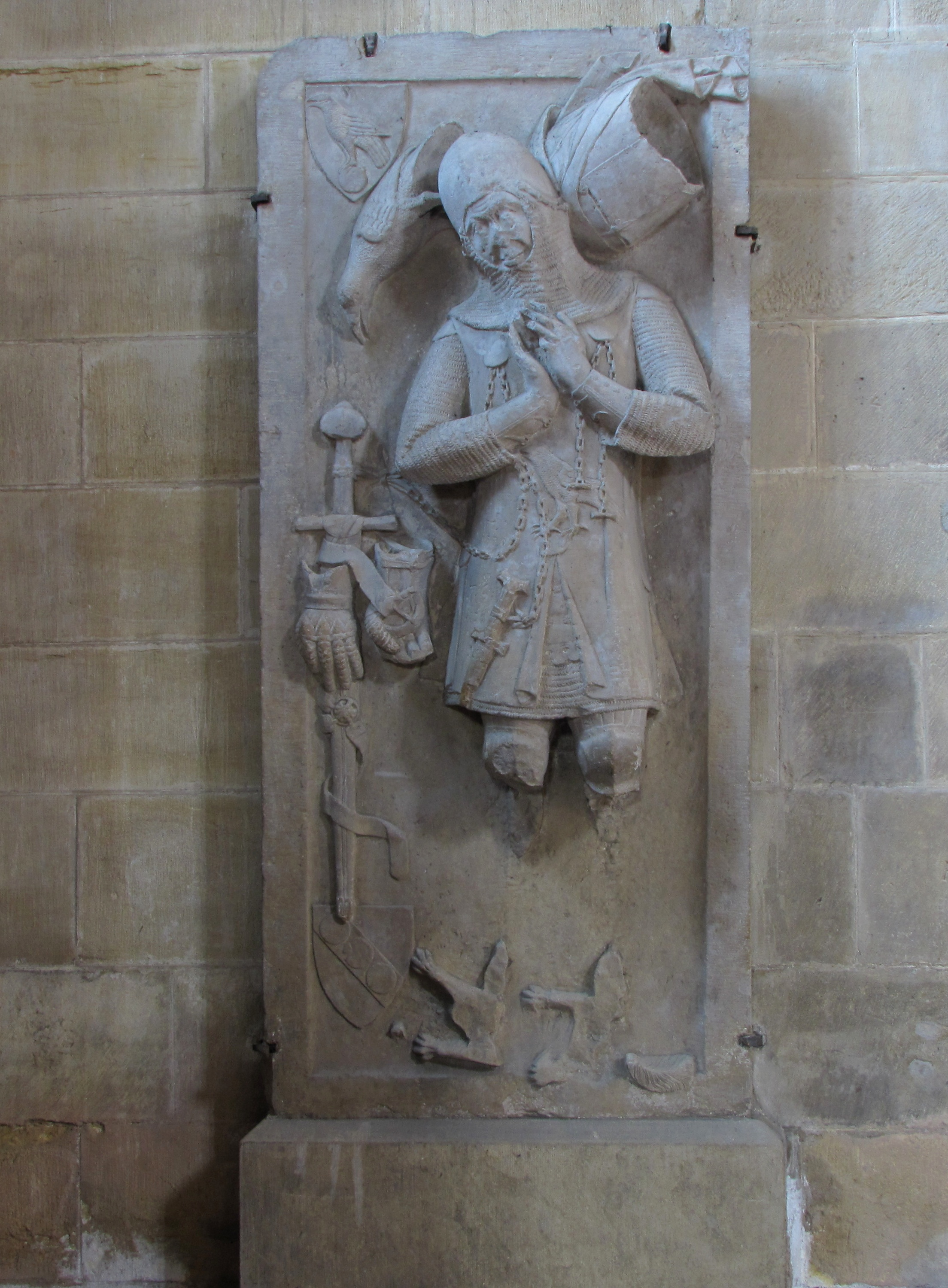 Alsace, Haut-Rhin, Église Notre-Dame de l'Assomption de Rouffach (PA00085638, IA68004432).Dalle funéraire du Chevalier Werner Falcke (vers 1340): This object is classé Monument Historique in the base Palissy, database of the French furniture patrimony of the French ministry of culture, under the references PM68000786 and IM68007724.